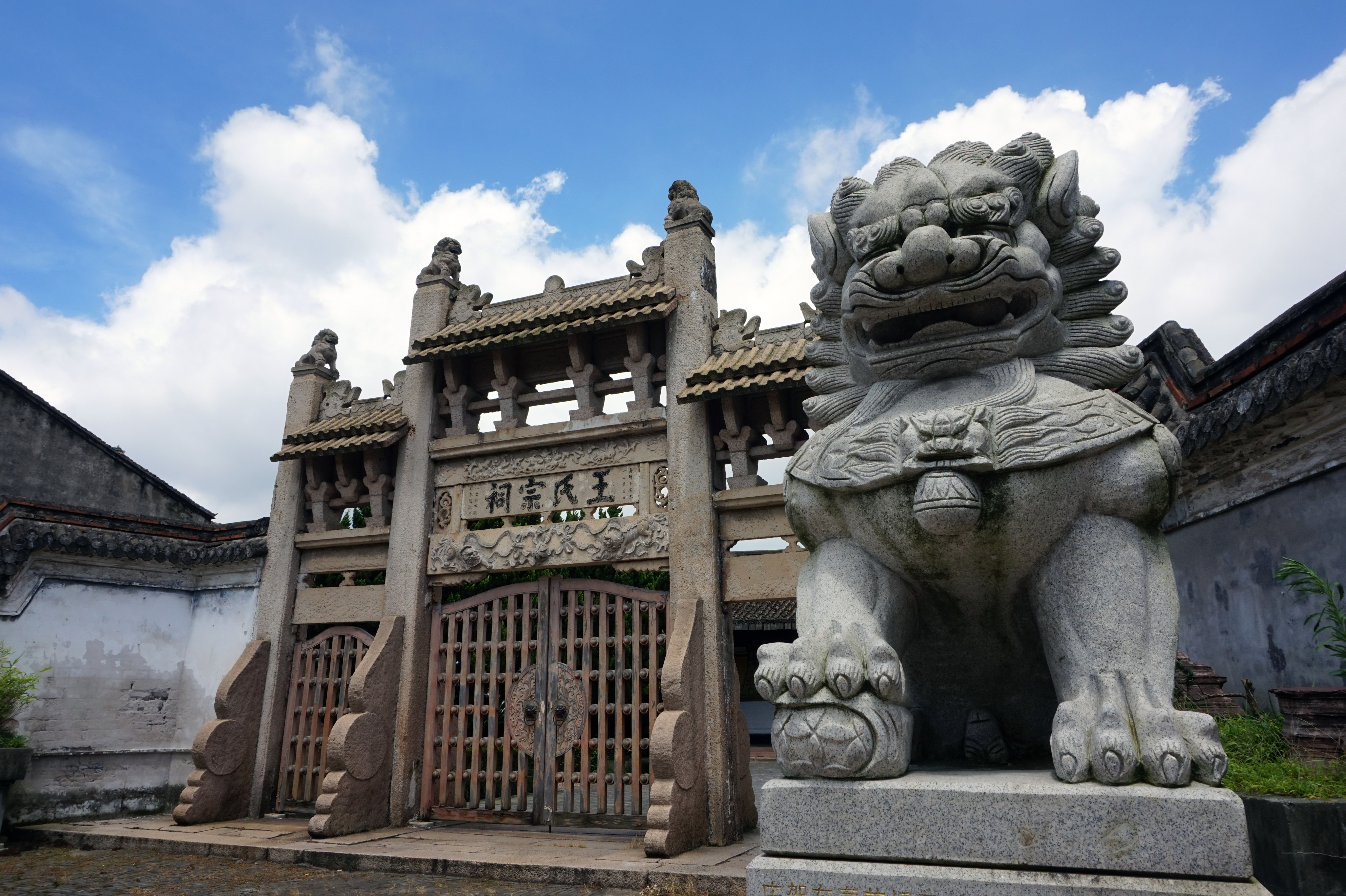 永昌堡王氏宗祠。